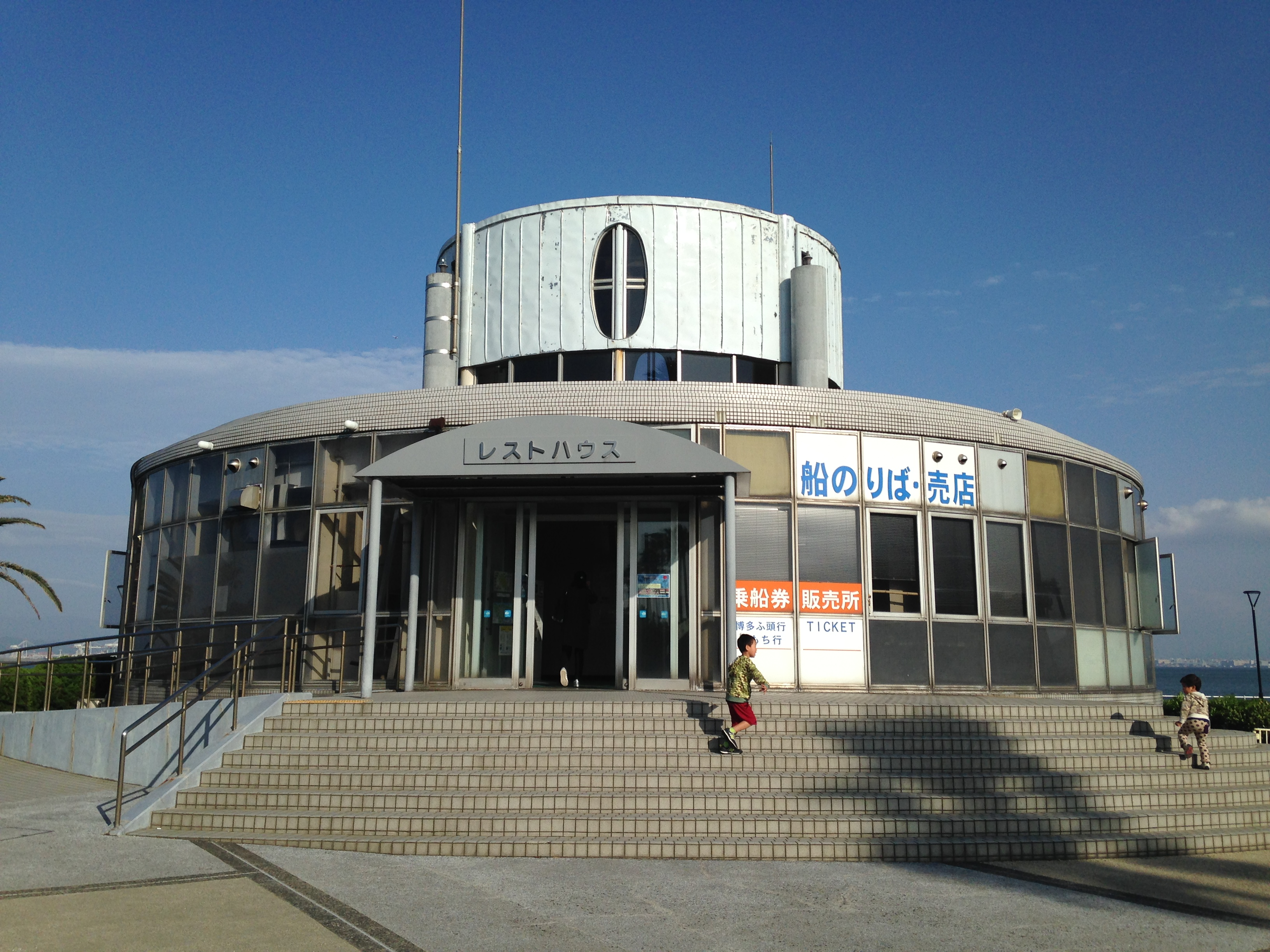 マリンワールド海の中道付近にある安田産業汽船の乗船券売り場